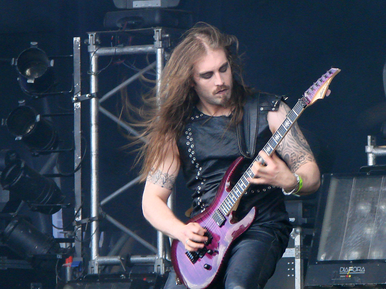 Cradle of Filth au Hellfest 2009: Charles Hedger à la guitare.